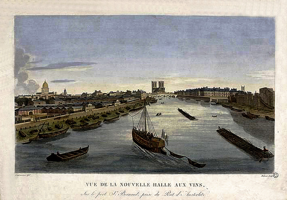 Vue de la nouvelle Halle aux vins de Paris première partie du XIXe siècle